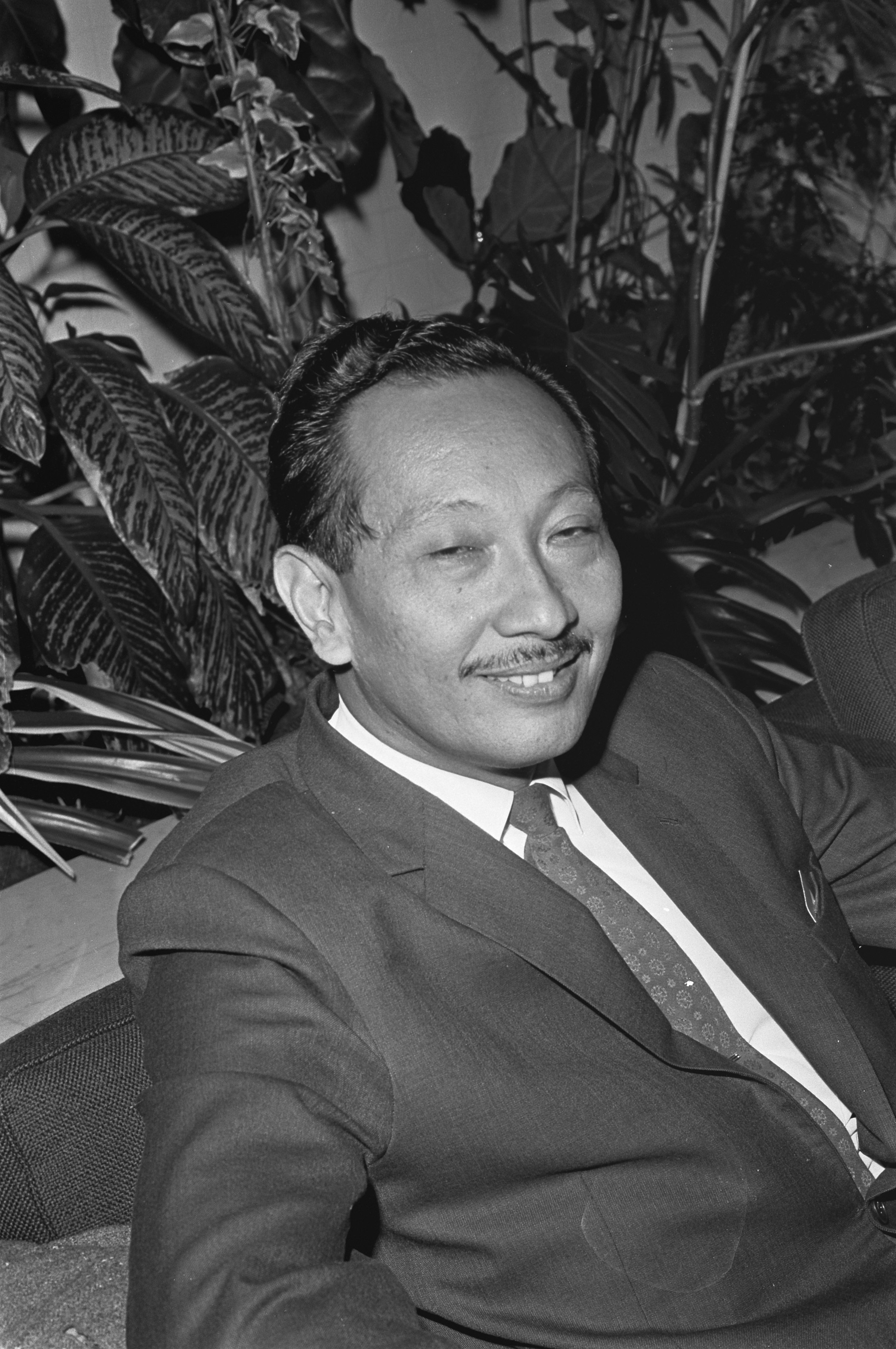 Collectie / Archief : Fotocollectie Anefo Reportage / Serie : [ onbekend ] Beschrijving : Aankomst Minister Mashuri (kop) van O.V. en W. in Indonesie op Schiphol Datum : 22 oktober 1968 Locatie : Noord-Holland, Schiphol Trefwoorden : KOPPEN, aankomsten Fotograaf : Kroon, Ron / Anefo Auteursrechthebbende : Nationaal Archief Materiaalsoort : Negatief (zwart/wit) Nummer archiefinventaris : bekijk toegang 2.24.01.05 Bestanddeelnummer : 921-7871